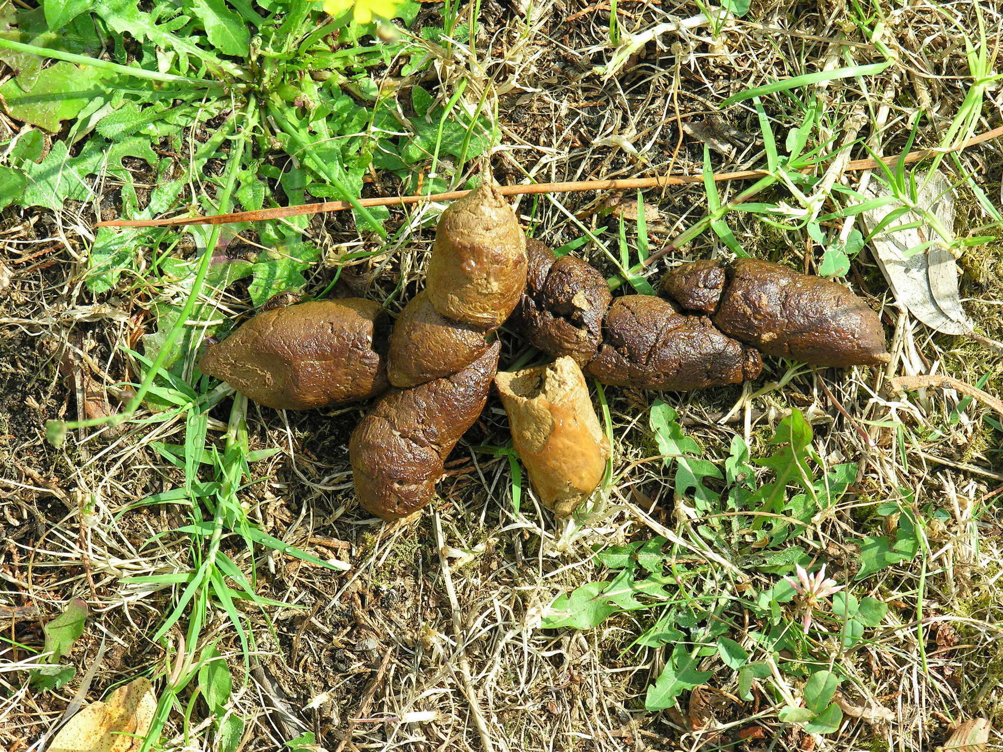 Feces de can